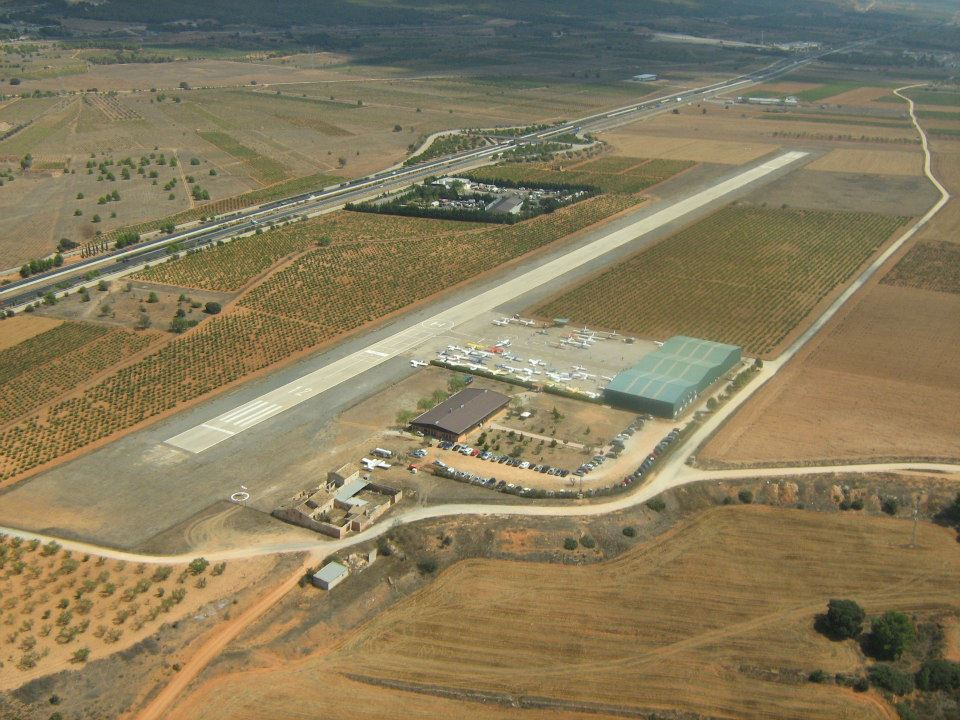 Vista áerea del Aeródromo de Requena